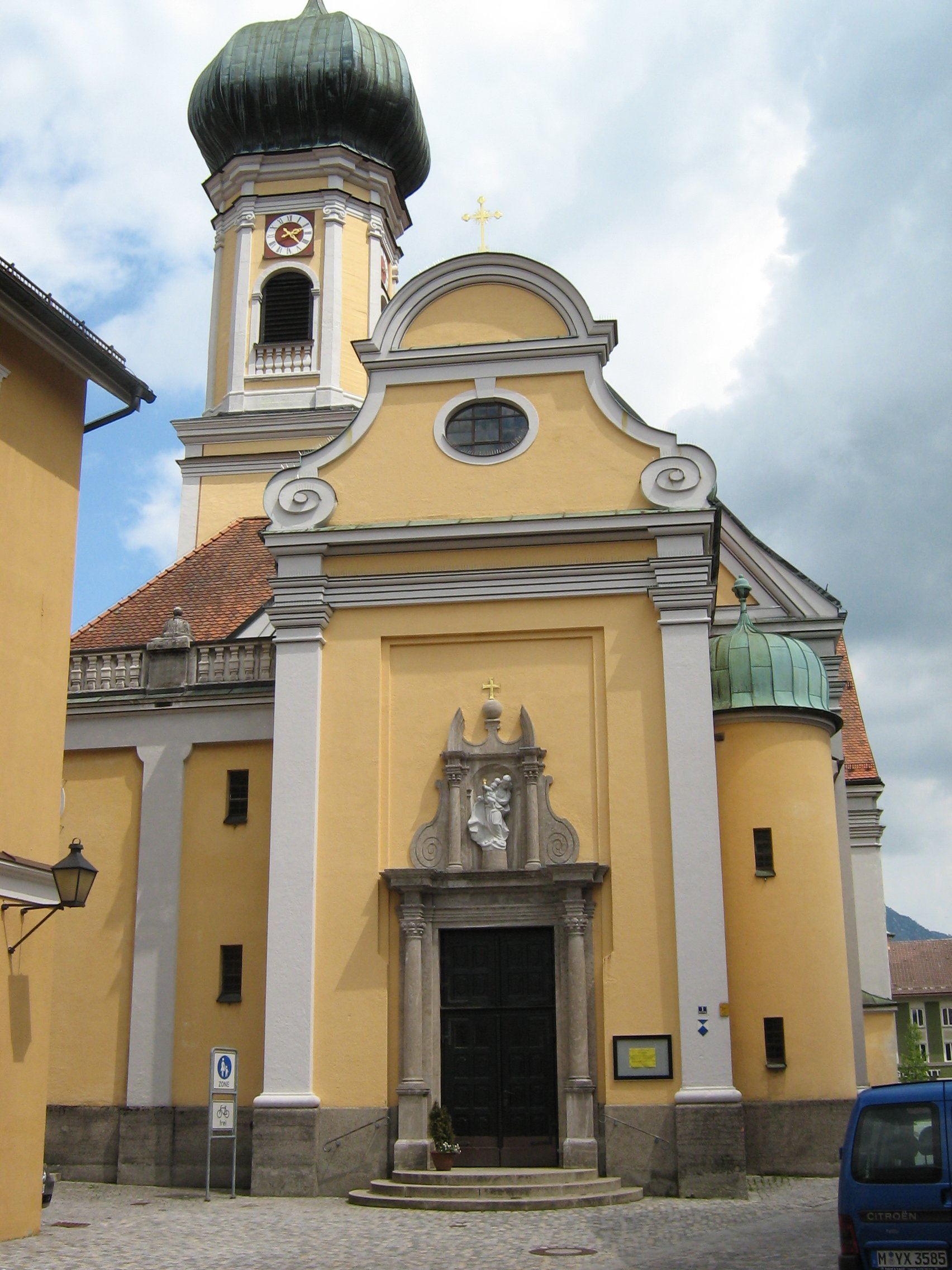 Immenstadt im Allgäu, Pfarrkirche St. Nikolaus